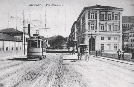 Ancona - via Marconi